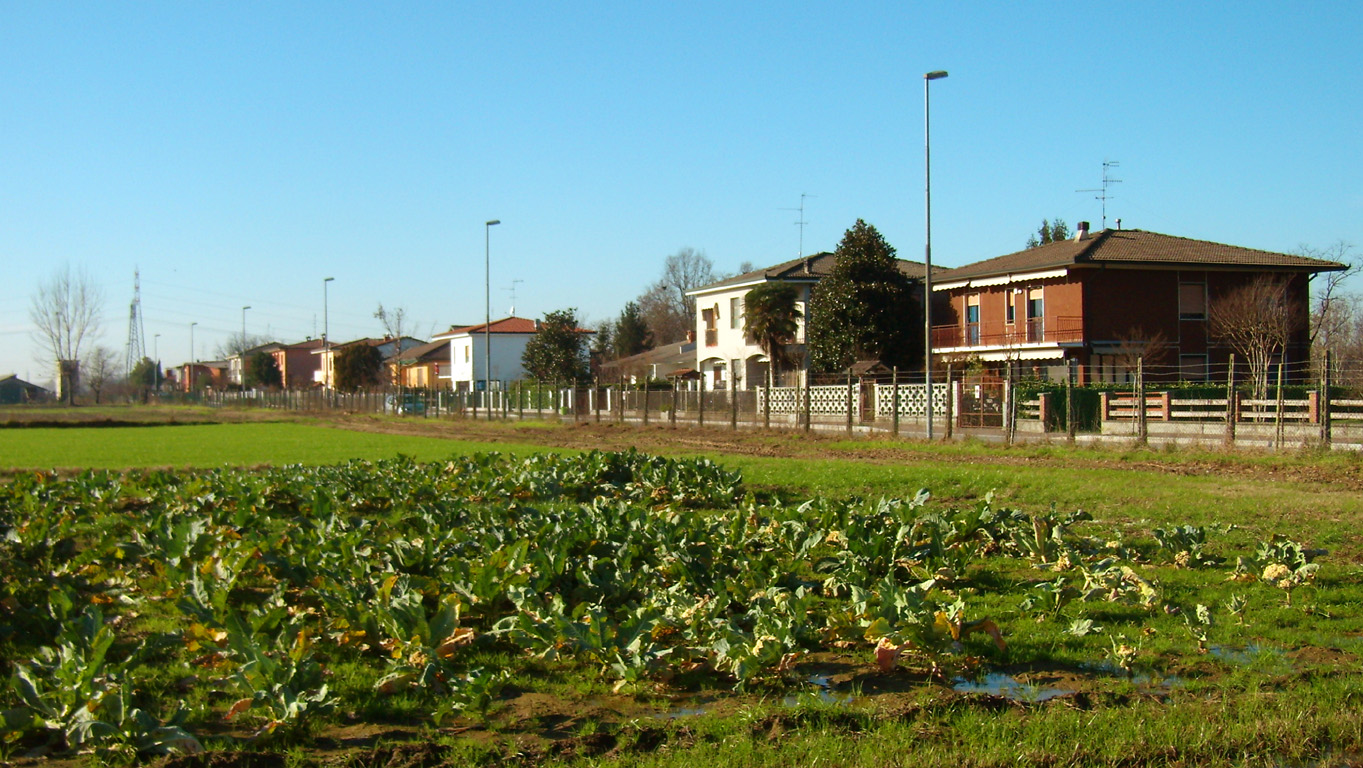 Vista di Arcagna, frazione di Montanaso Lombardo